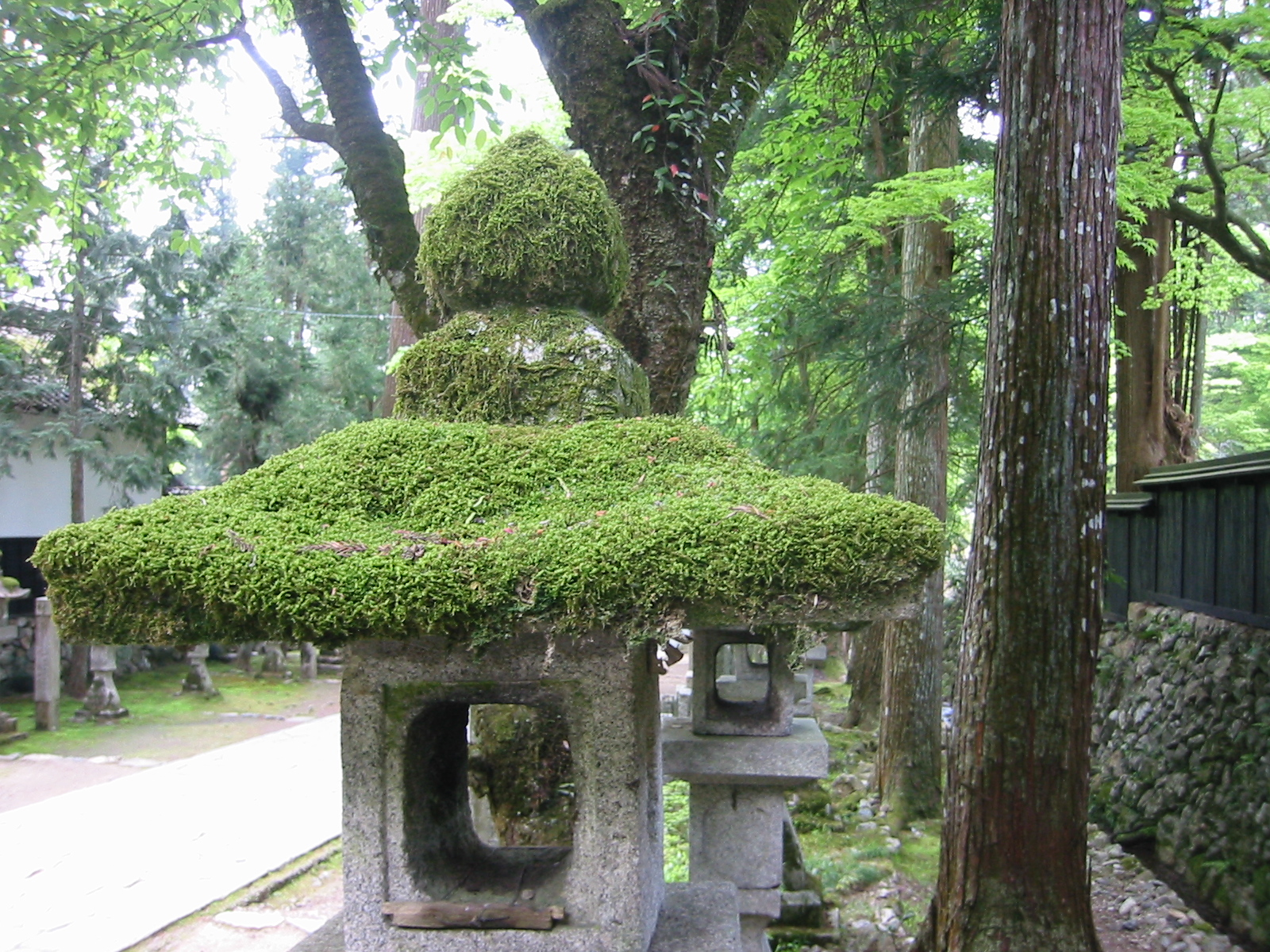 谷汲山華厳寺